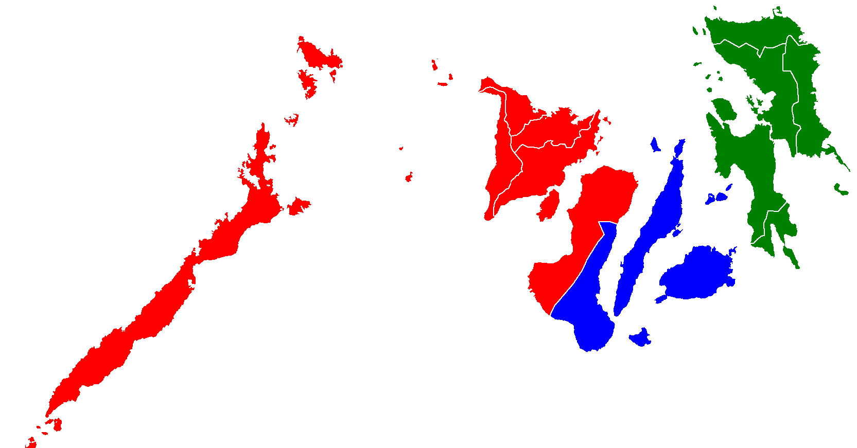 Cebuano: Mapa sa Kabisay-an nga gikolor-kowd pinaagi sa rehiyon. Gihimo ni Howard the Duck. Gipagawas ubos sa GNU FDL.